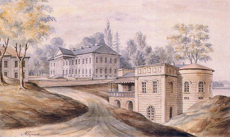 MŁYNÓW. Pałac Chodkiewiczów. Widok fasady i elewacji bocznej. Z lewej strony fragment dwukondygnacjowej oficyny; z prawej pawilon o zróżnicowanej bryle, z tarasem na arkadach i rotundą w narożu. Napis: Młynów; napis na podkładzie: Wołyń Młynów - pałac. 1862-1876. Rys. ołówkiem podmalowany akwarelą. 22,8 x 31,2 cm. Muzem Narodowe, Kraków. III-r.a. 4207 (Teka Wołyń).